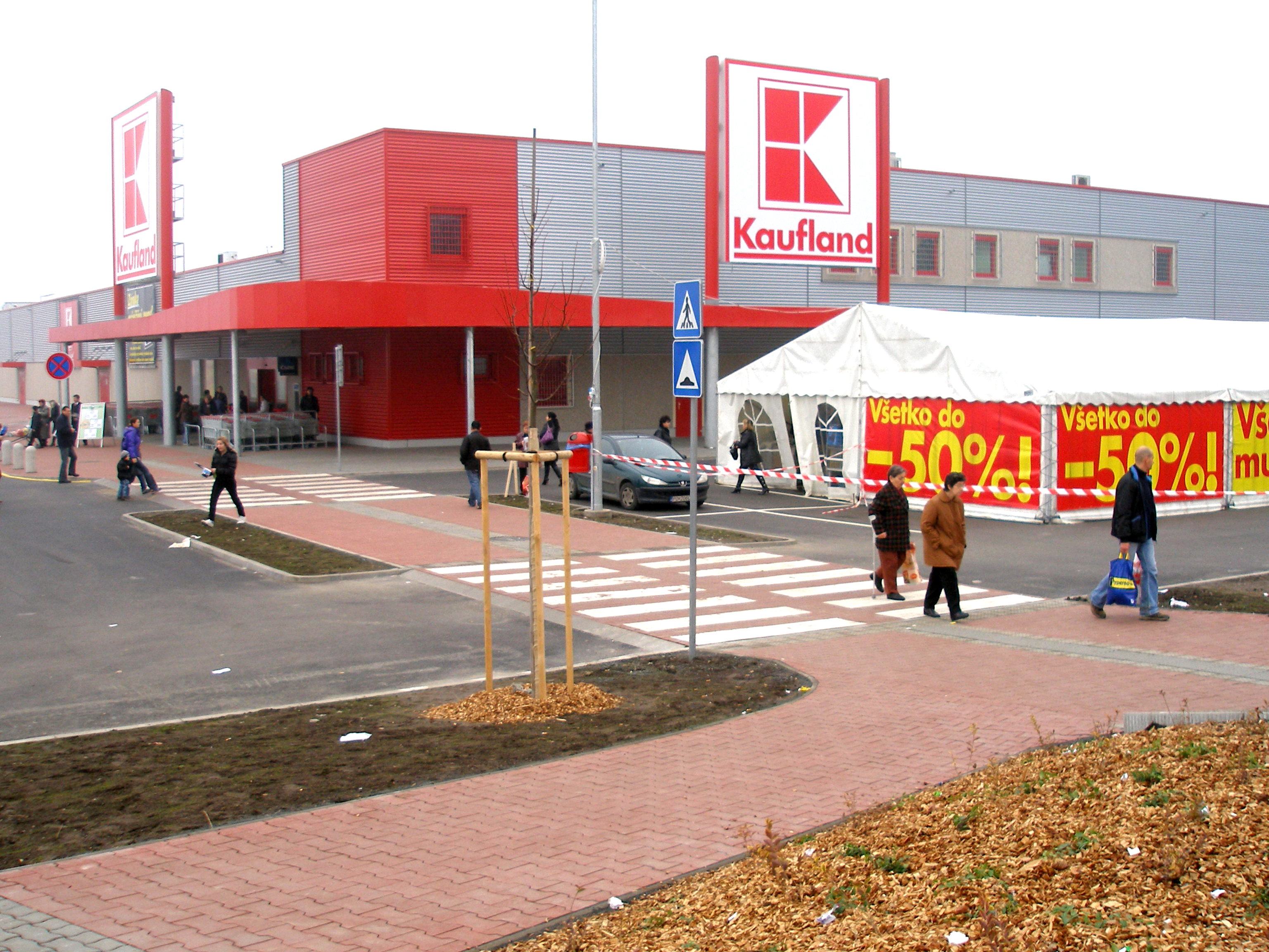 Supermarket Kaufland Prešov, sídlisko Sekčov. Otvorený 12.11.2009.